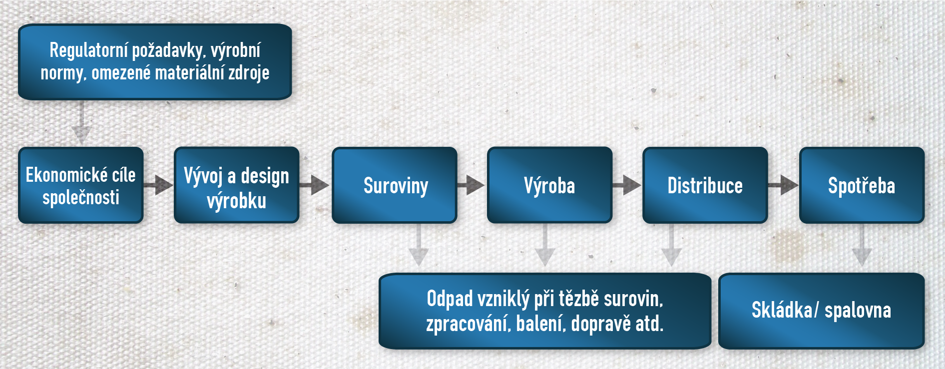 Produkční řetězec v tradičním výrobním schématu podle zásad Cradle to Grave. Produkujeme výrobky, a když je použijeme, končí na skládce.